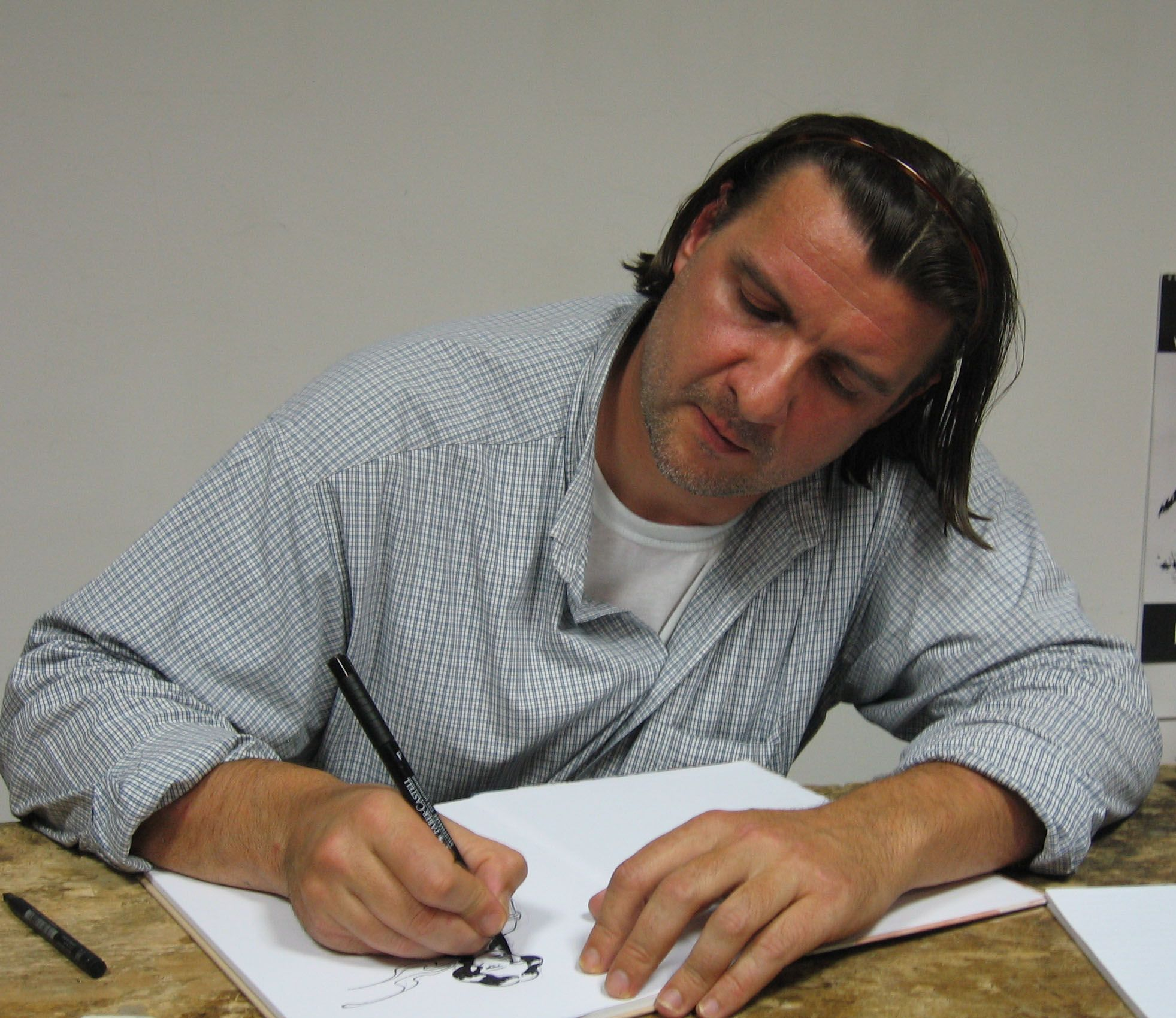 Zoran Smiljanić na predstavitvi drugega dela Meksikajnarjev (2008)